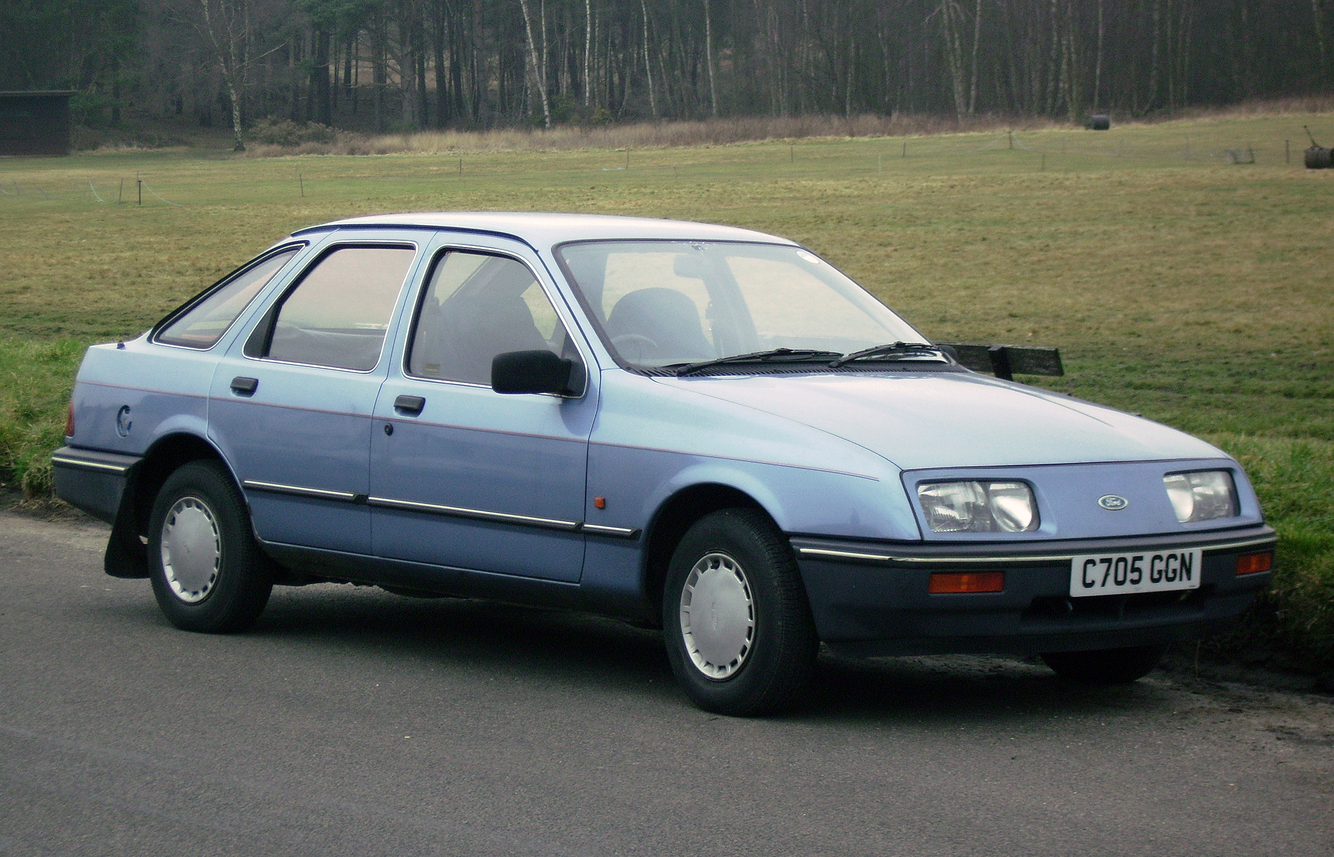 1984 Sierra,Reigate Heath,Feb 2009